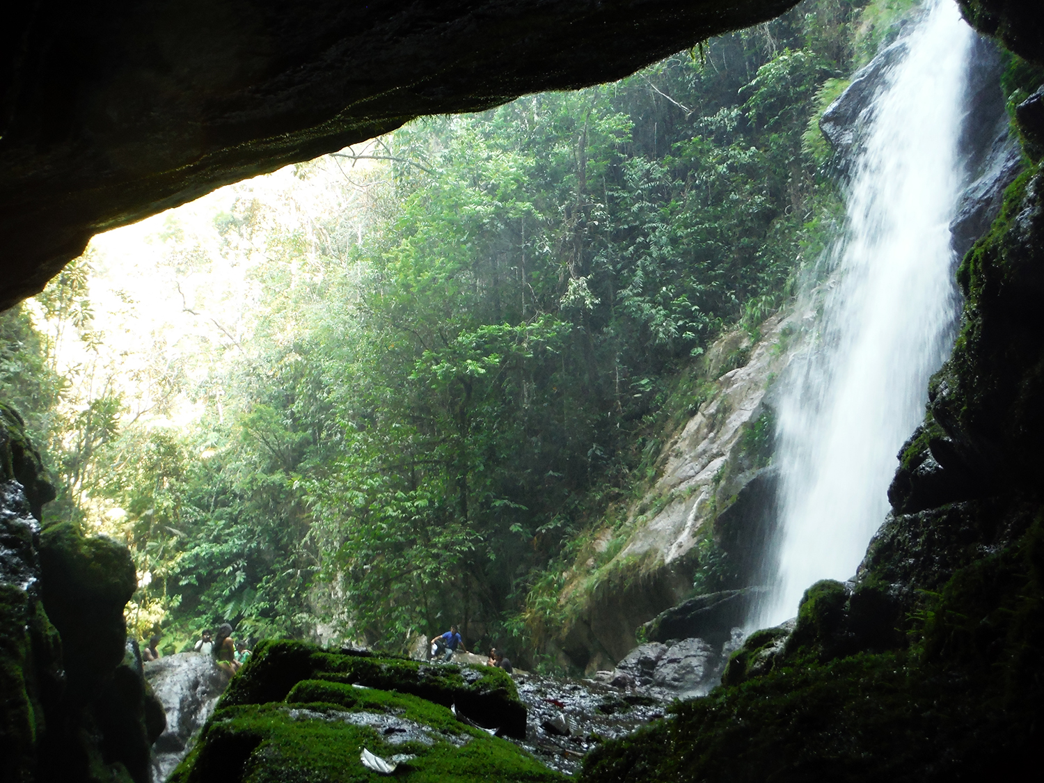 Vista de la catarata desde la cueva del Cotomono